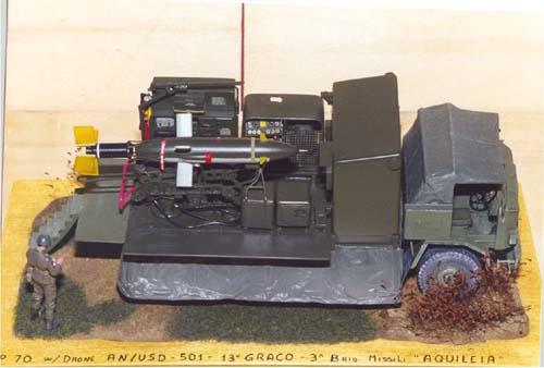 Modellino Cp 70 Drone "13° Graco"